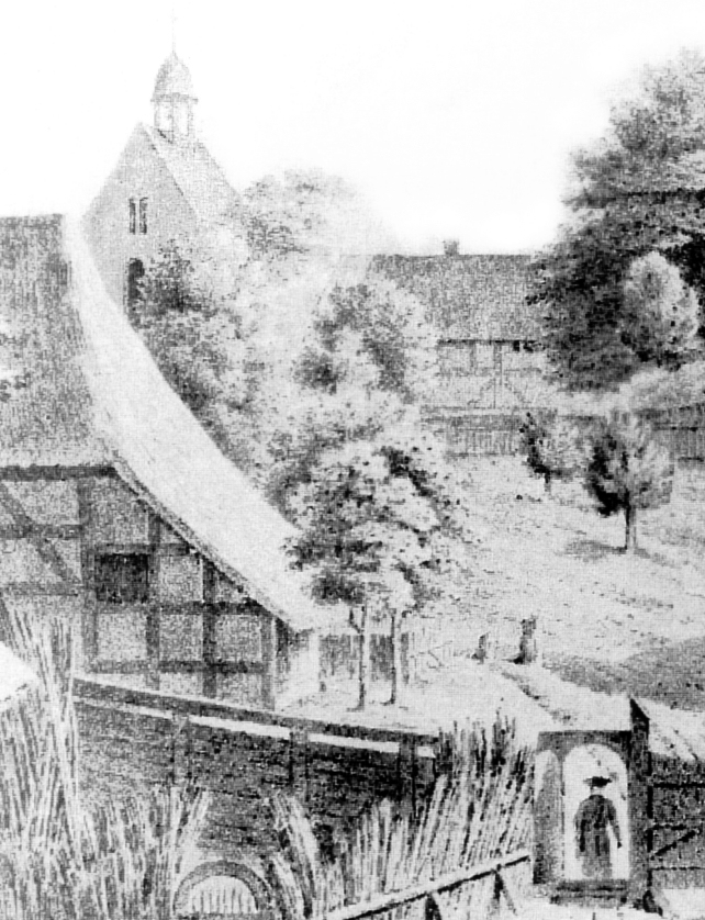 St.-Stephani-Kirche (Räbke), Vorgängerbau, 1798 abgerissen